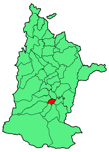 Aipaturiko udalerriaren kokapena Zuberoan